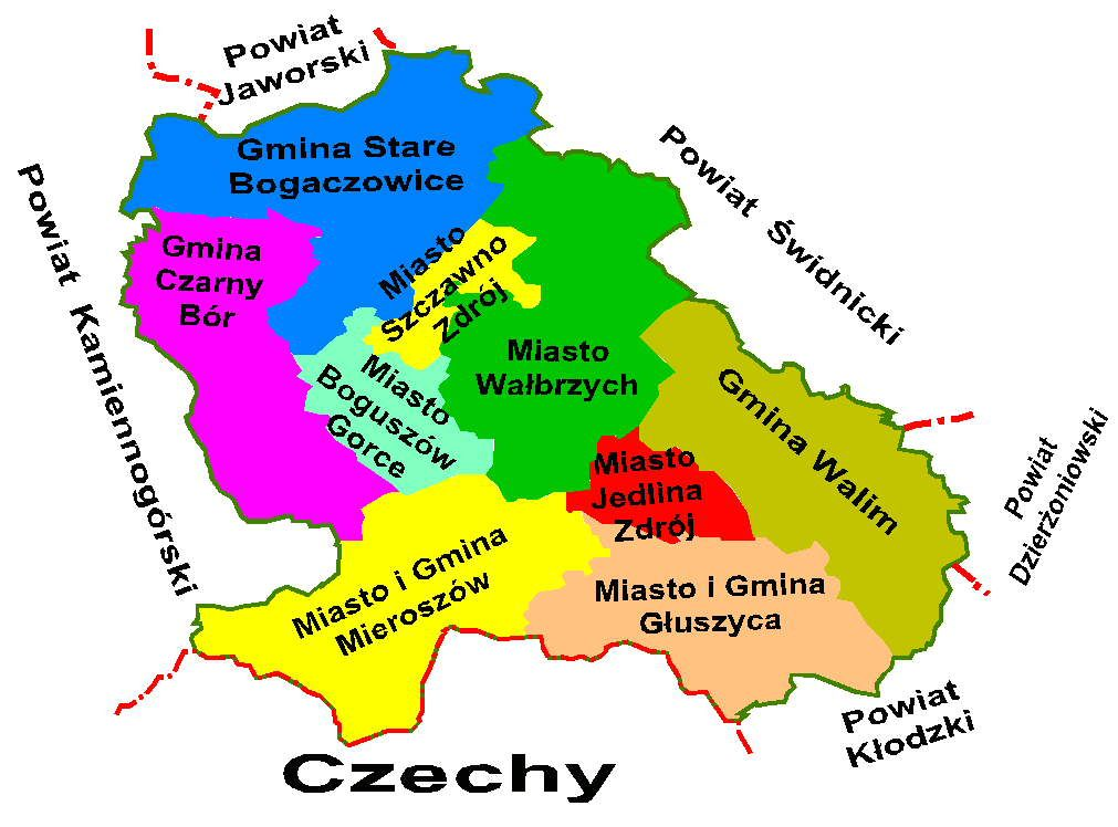 Mapka powiatu wałbrzyskiego